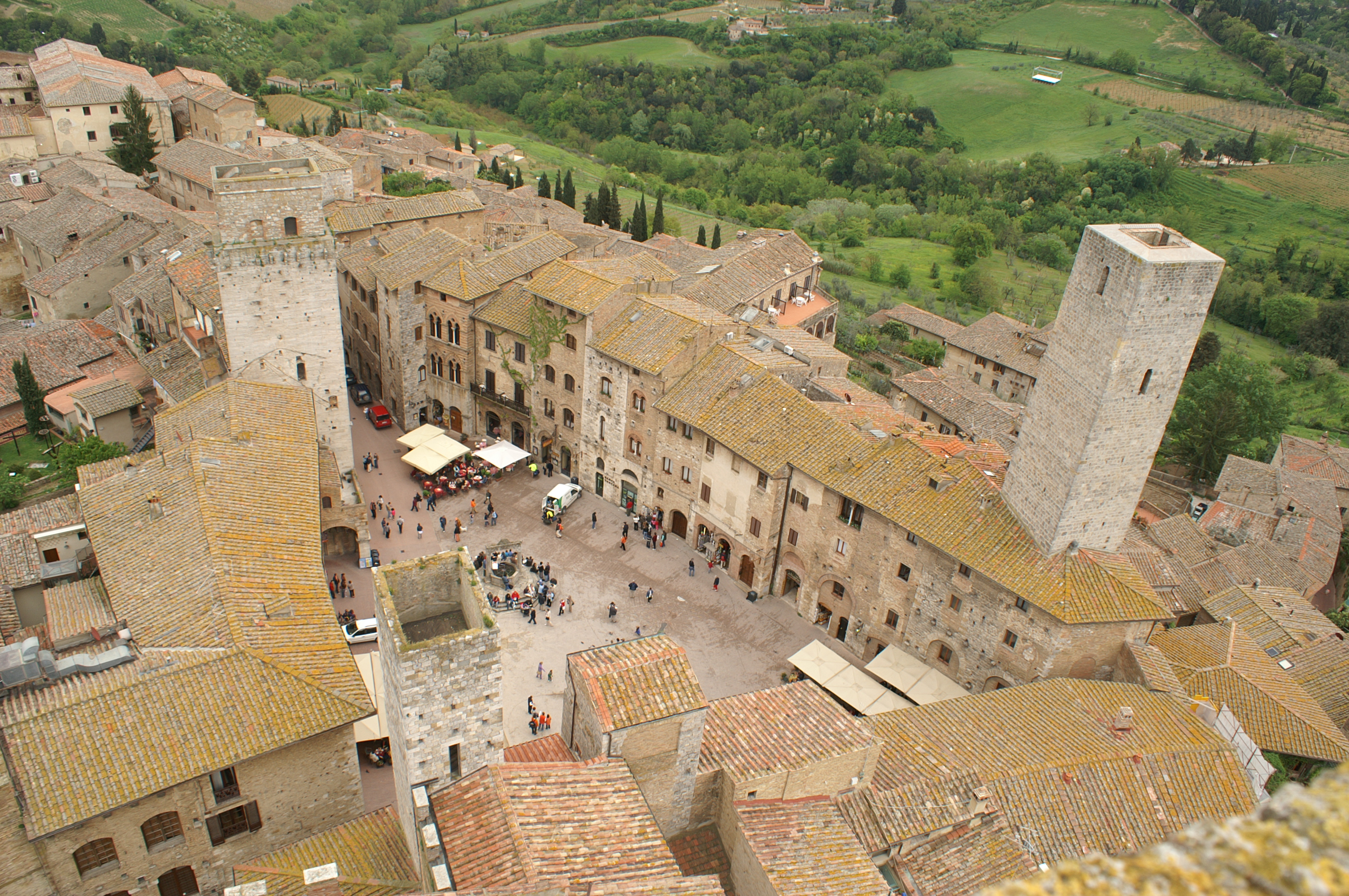 Piazza della Cisterna